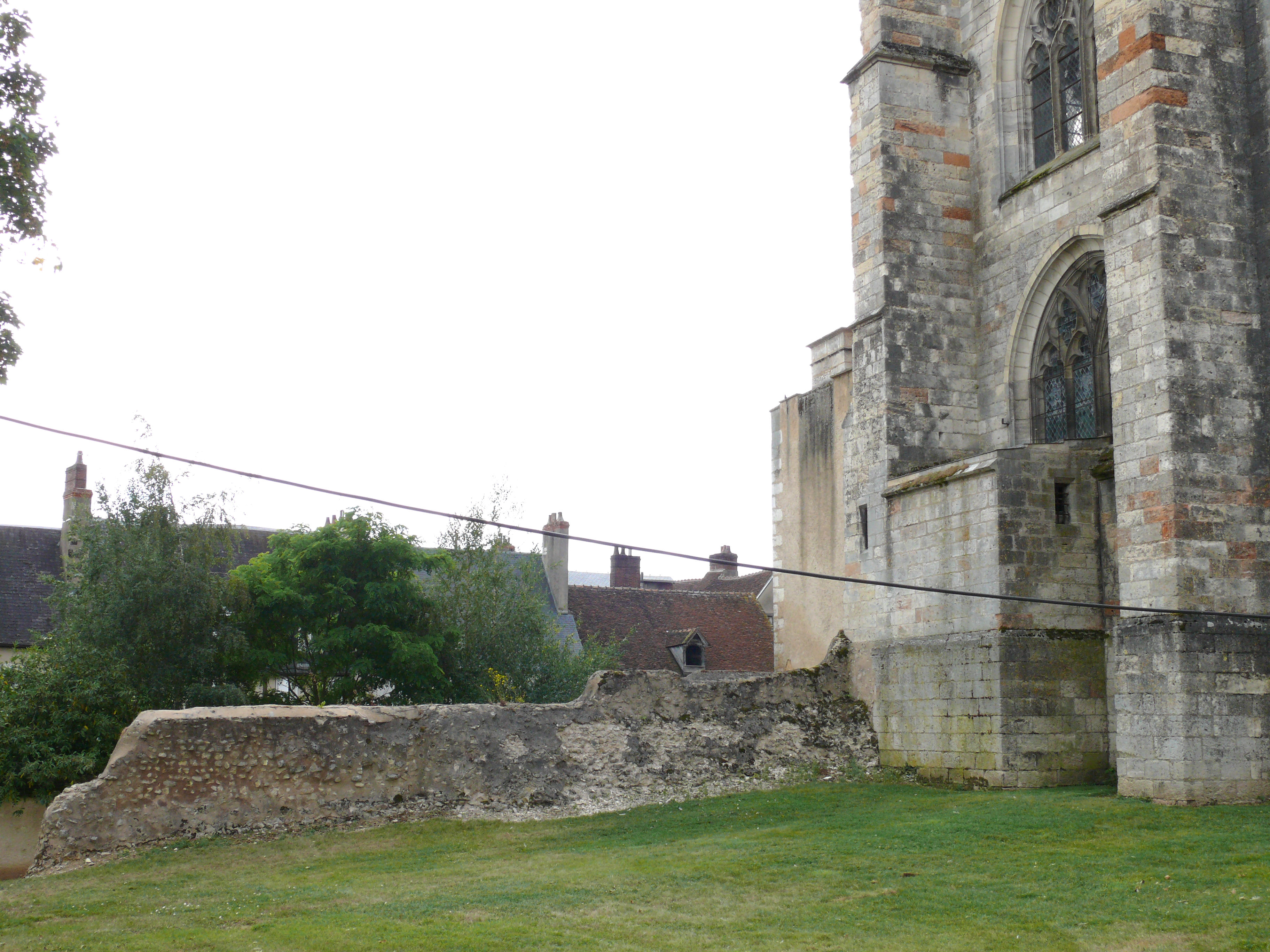 Bourges - Vestige du rempart gallo-romain au chevet de la cathédrale